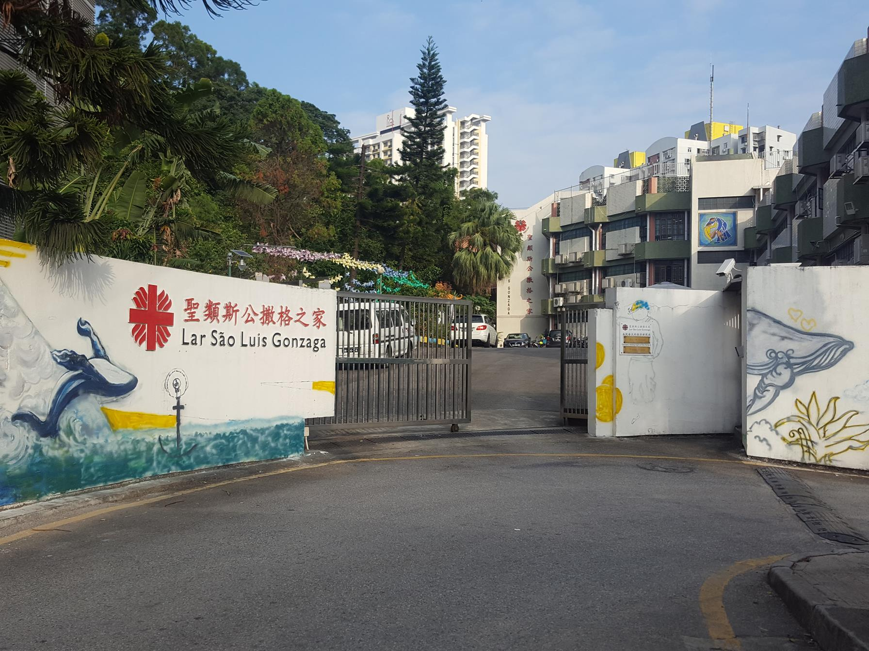 澳門明愛聖類斯公撒格之家